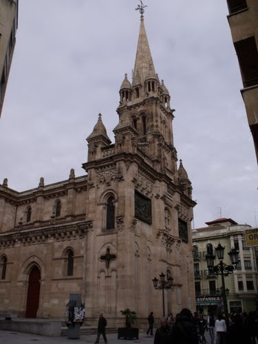 Fachada de la iglesia de San Juan de Sahagún (Salamanca)